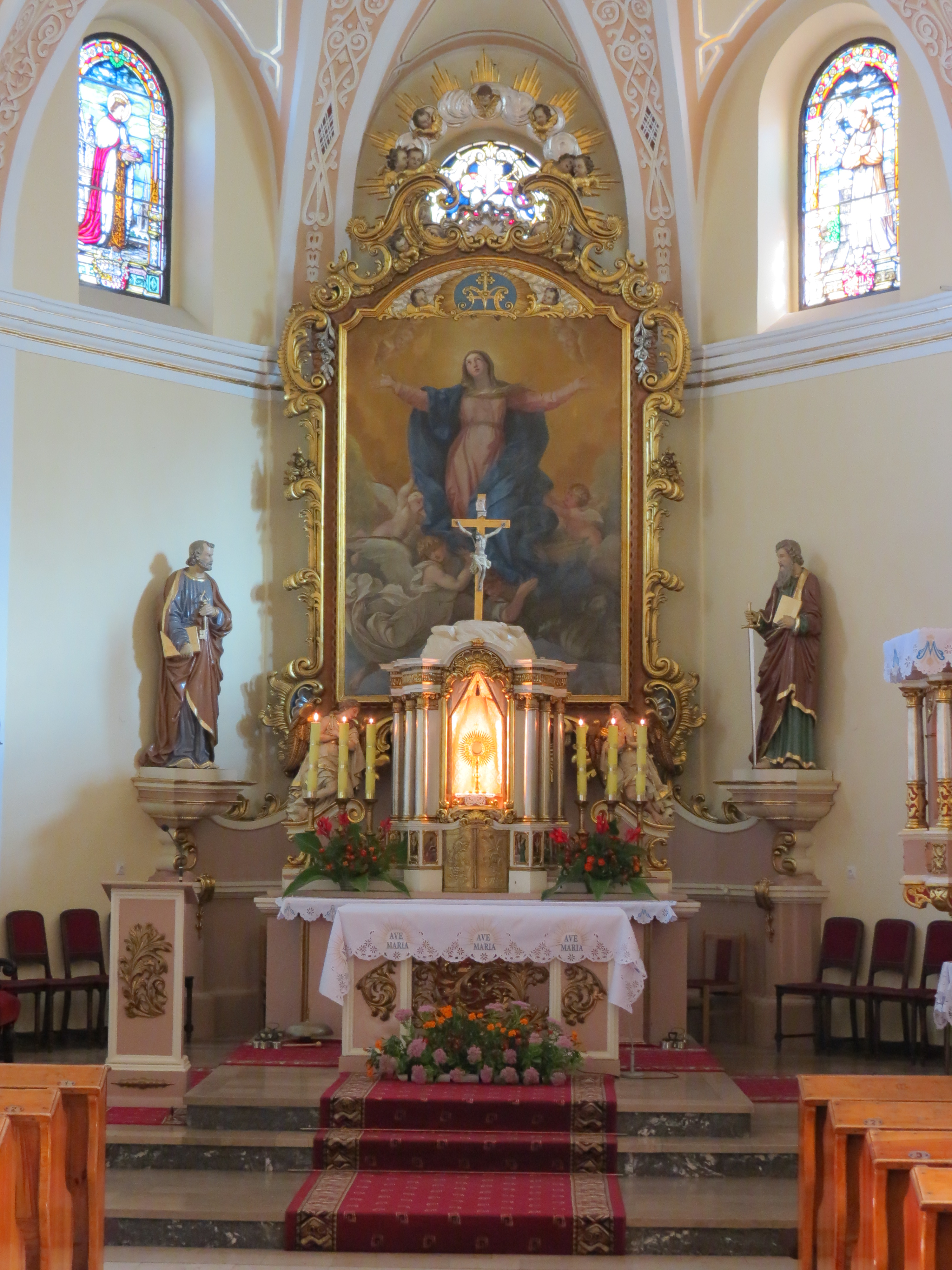 Gliwice Łabędy - kościół parafialny pw. Wniebowzięcia Matki Boskiejk (zabytek nr A/303/60)